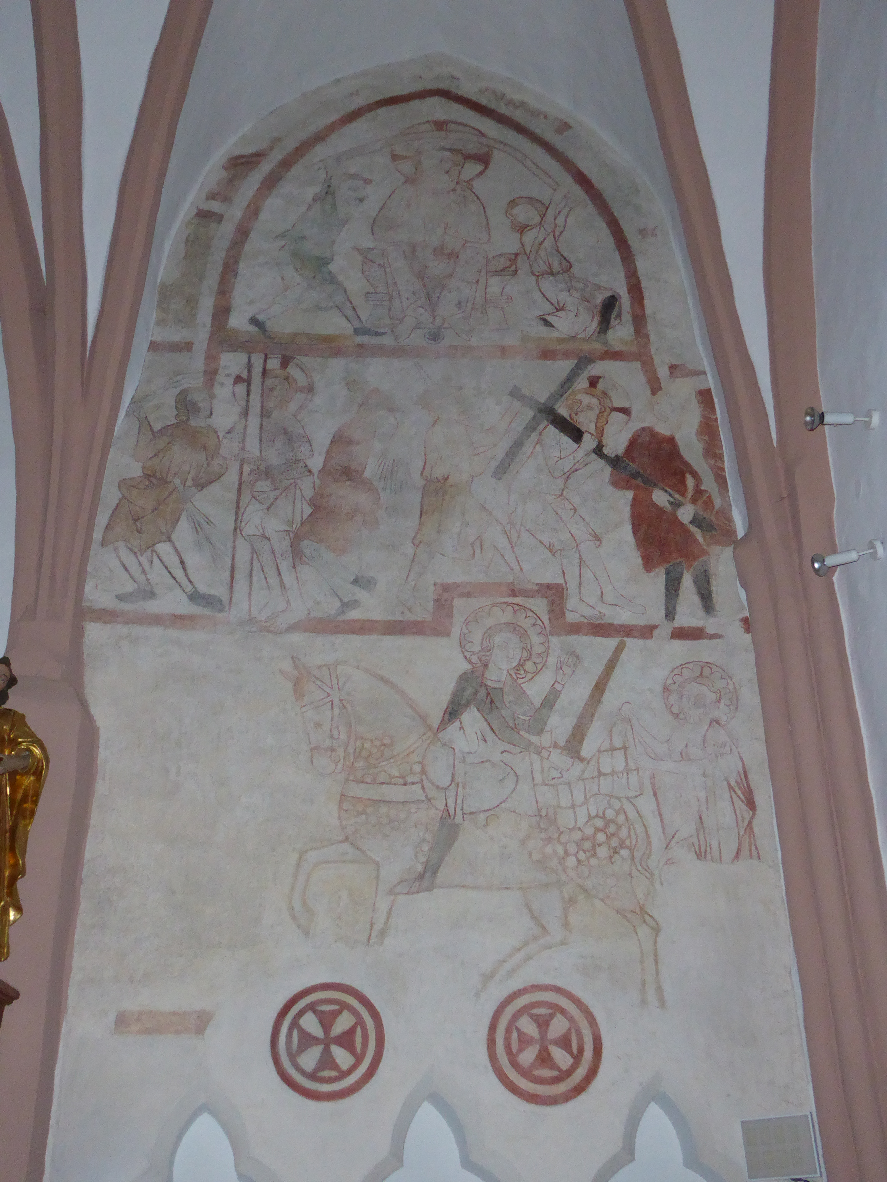 Pfarrkirche hl. Martin, St. Martin am Ybbsfelde, St. Martin-Karlsbach, Niederösterreich - Wandmalerei (um 1330) an der Südseite des Chores: Dornenkrönung, Geißelung, Kreuzweg, Mantelspende des hl. Martin